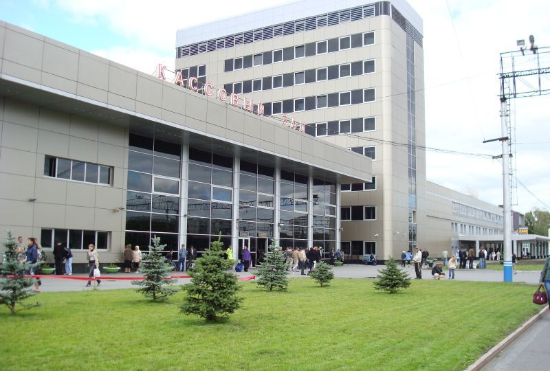 Здание вокзала в Тюмени